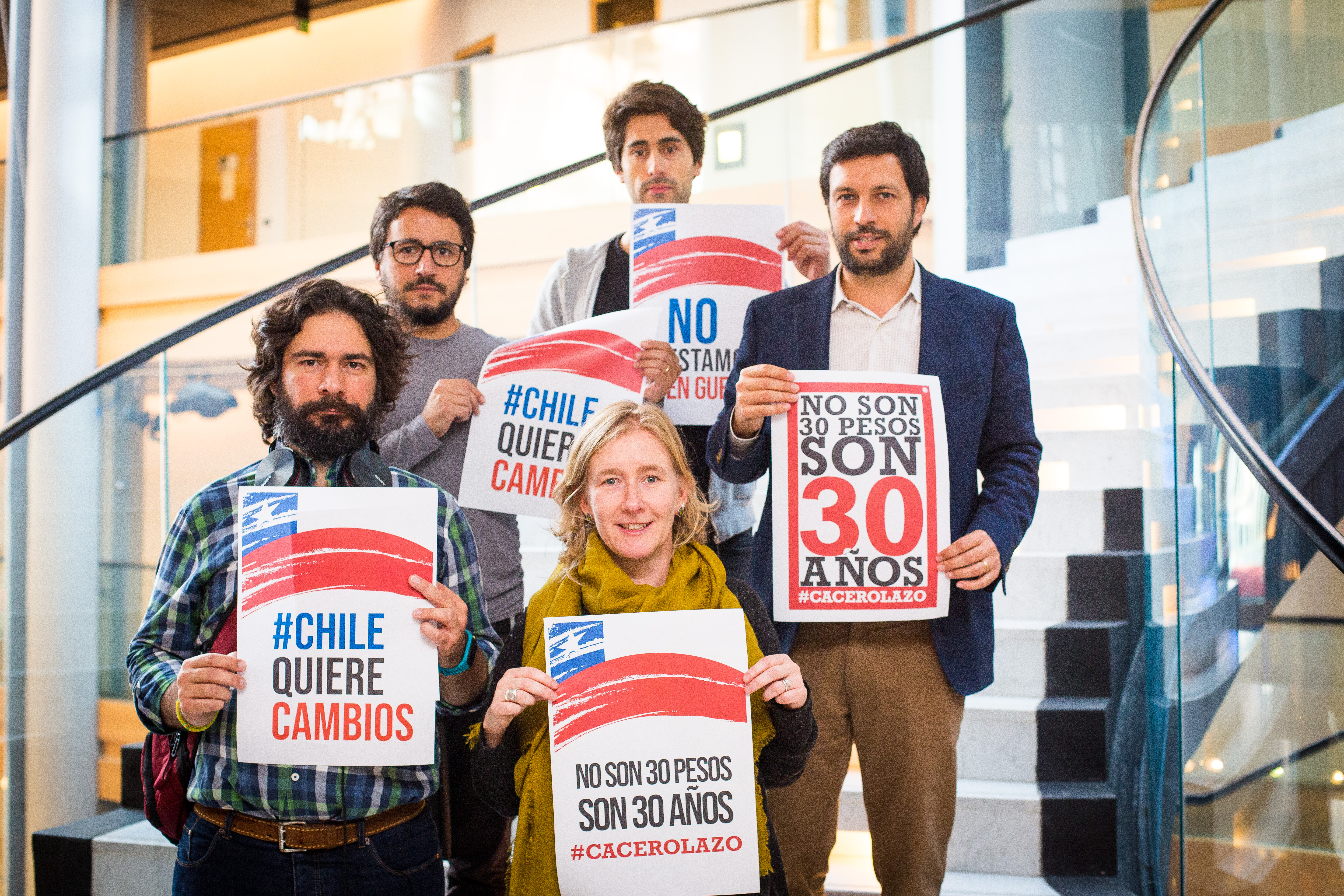 F70A2833